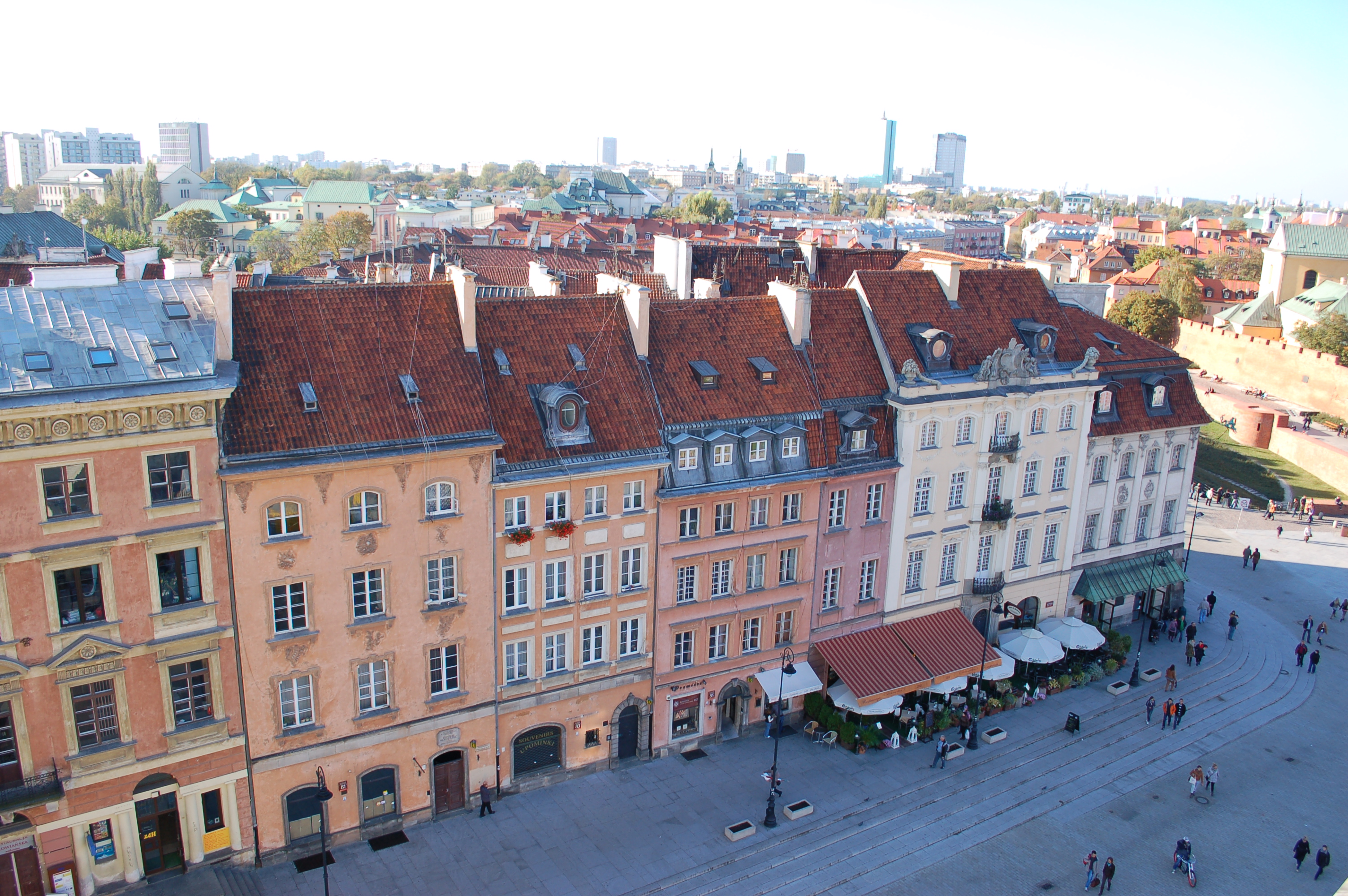 Schlossplatz/Krakowskie Przedmieście Warschau vom Kirchturm